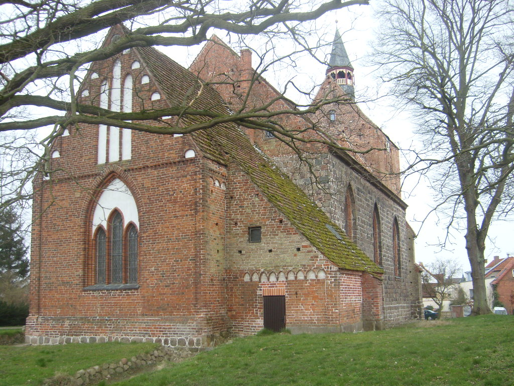 Nikolaikirche von Dassow im Landkreis Nordwestmecklenburg